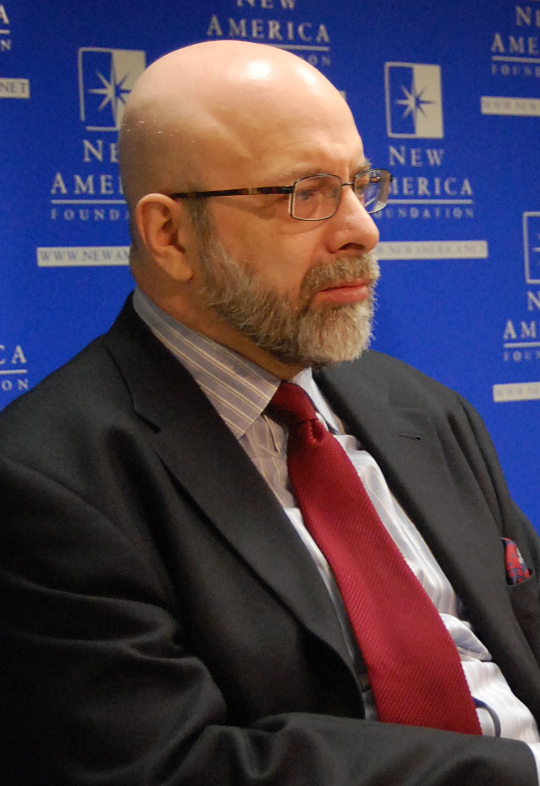 Dimitri K. Simes